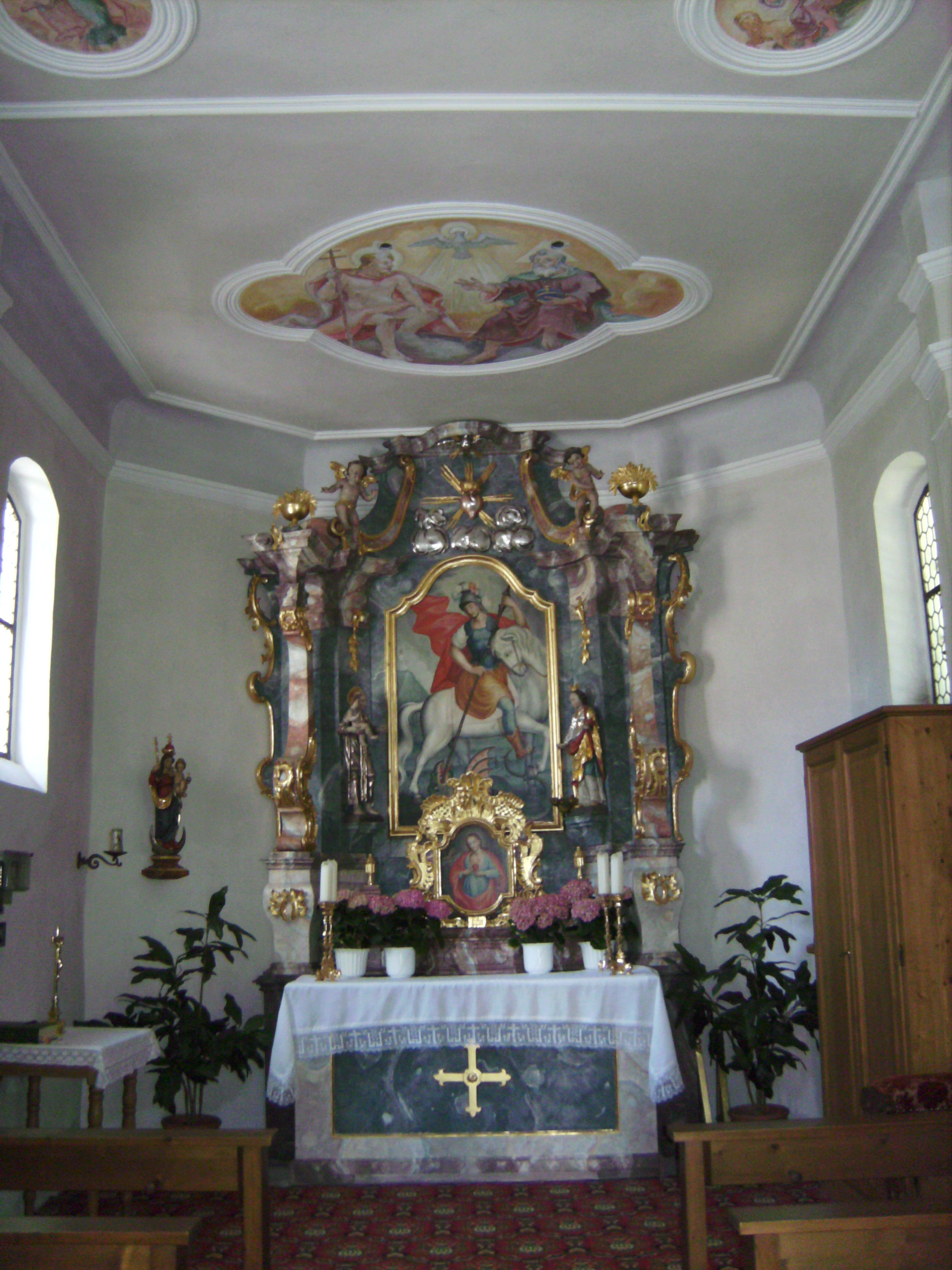 Altar